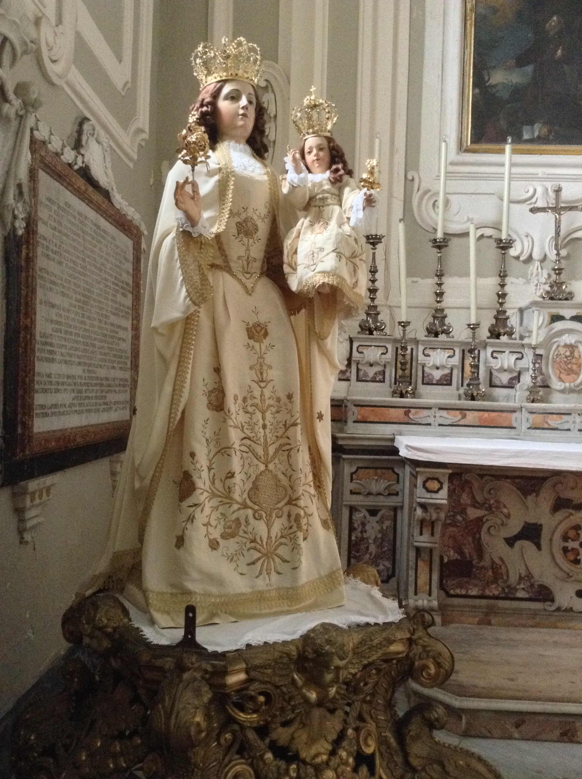 Madonna della Bruna nella Chiesa di San Francesco d'Assisi